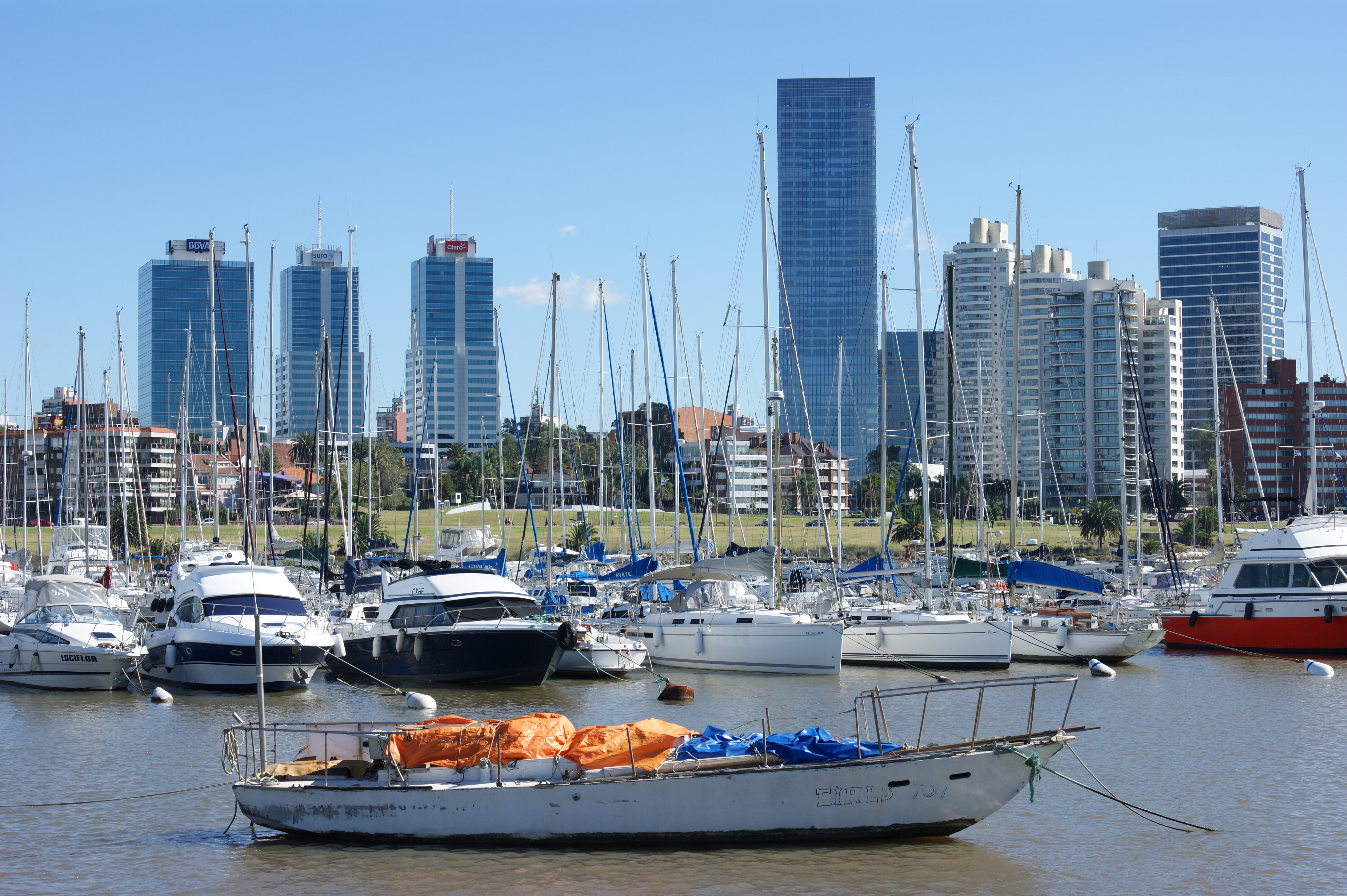 Montevideo, Uruguay